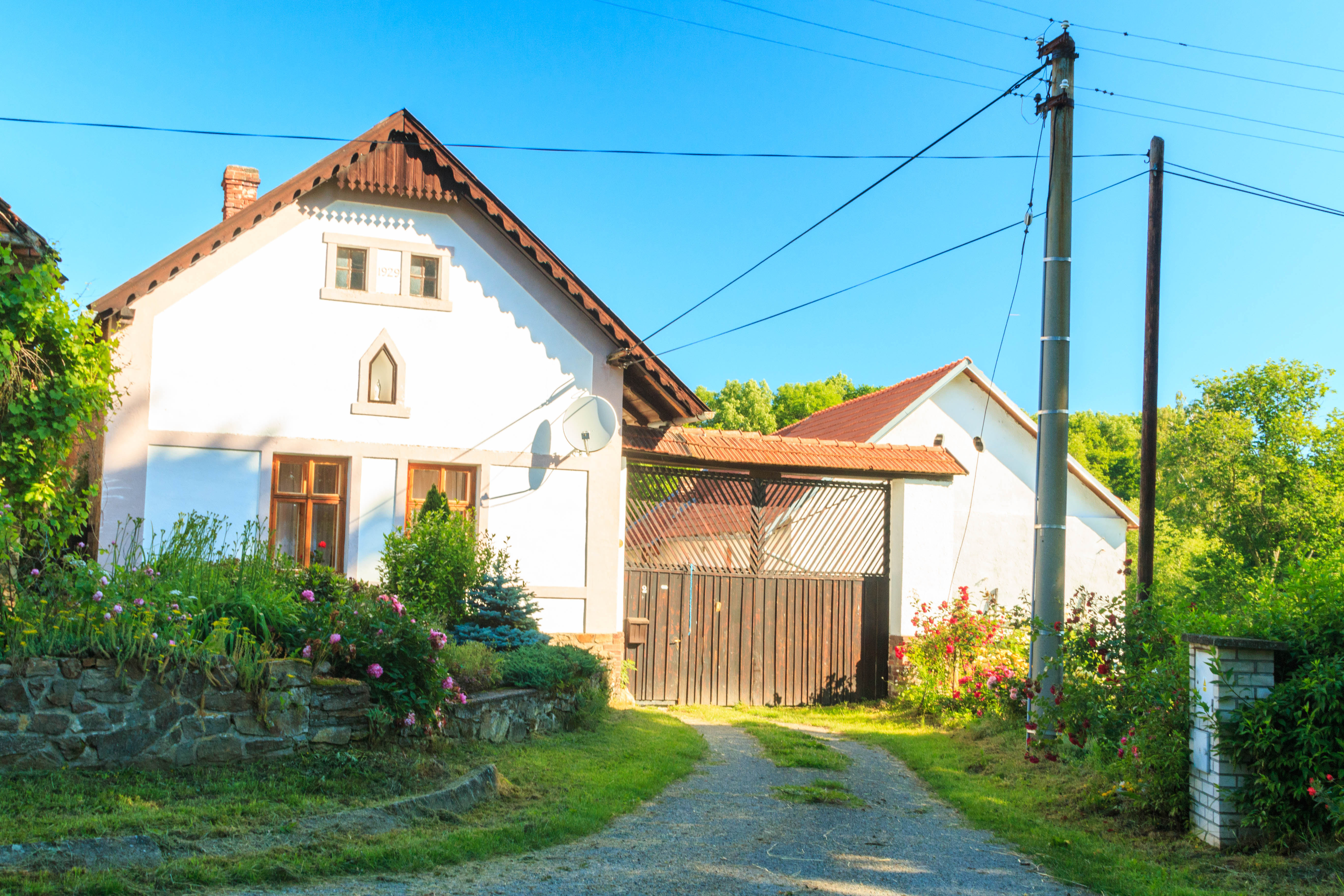 Zhoř u Vilémova č. 2